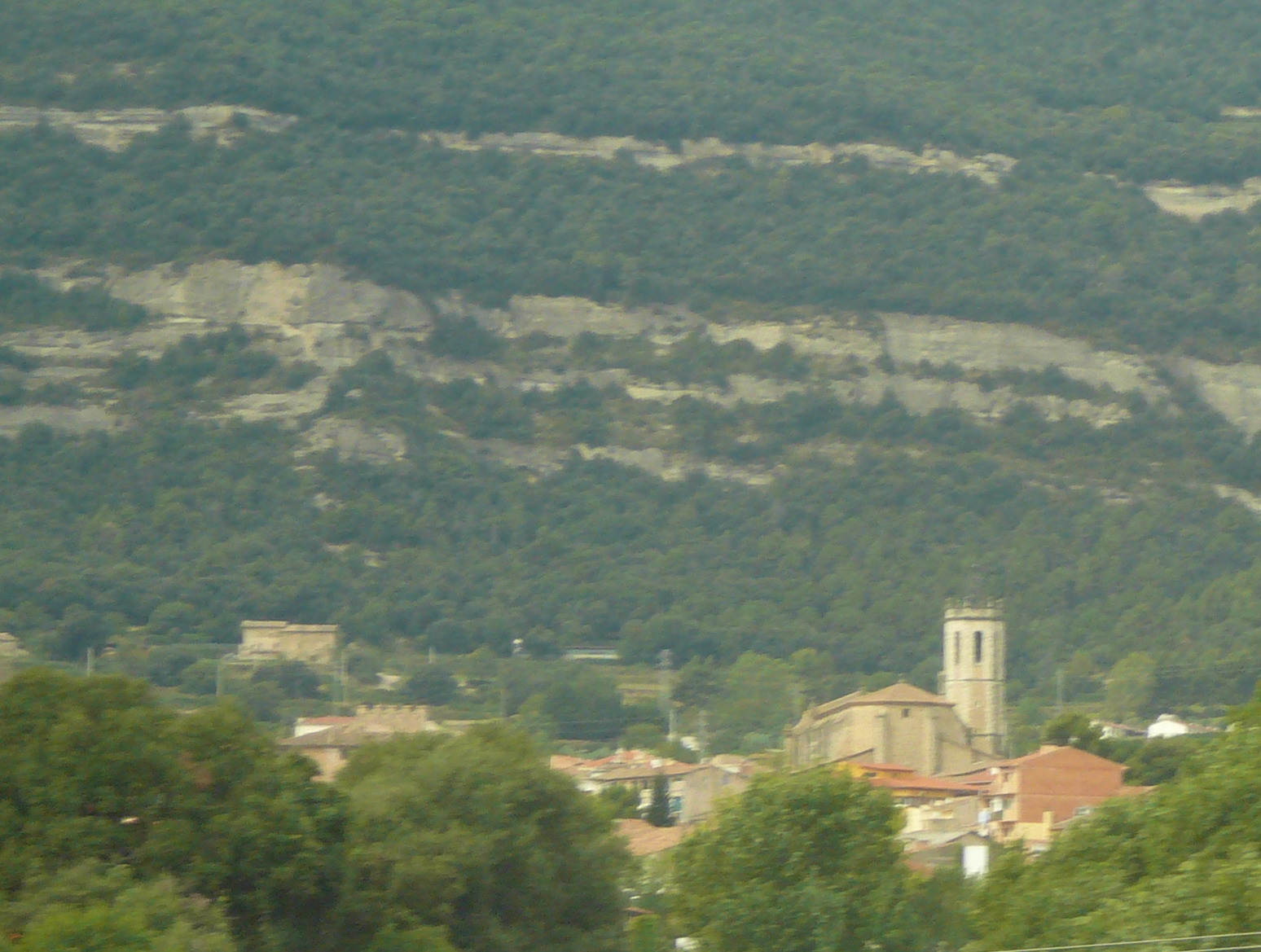 Vinyoles (Centelles)